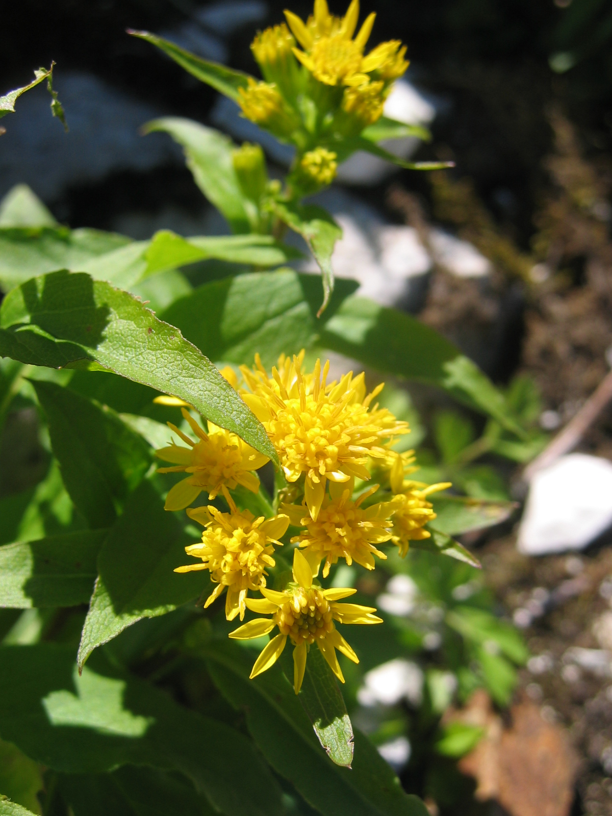 2006年8月5日、利用者自身の撮影。